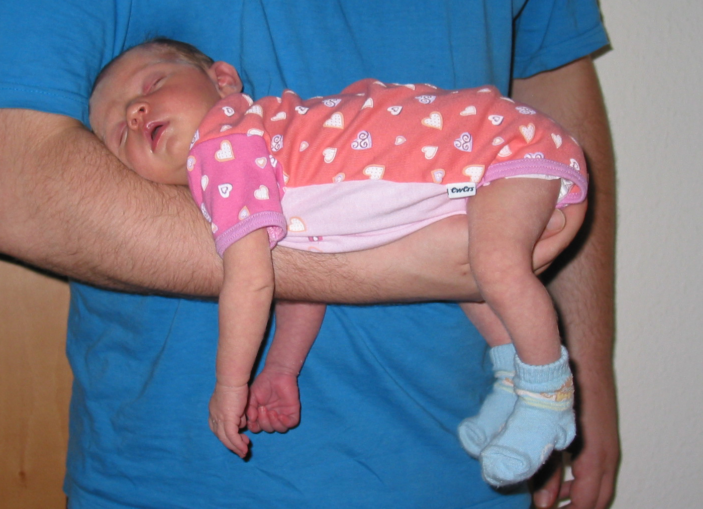 Fliegergriff (airman-hold)